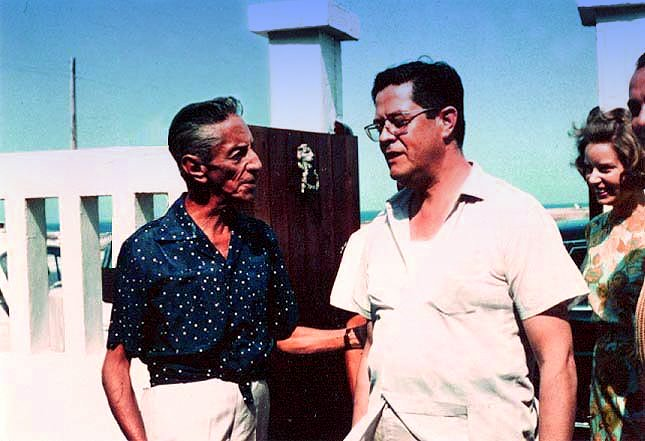 El Ing. Guillermo González Camarena, junto con el compositor Agustín Lara, ésta fue la última foto del inventor, ya que en el viaje de regreso murió en el accidente vehicular, cerca de la ciudad de Puebla.